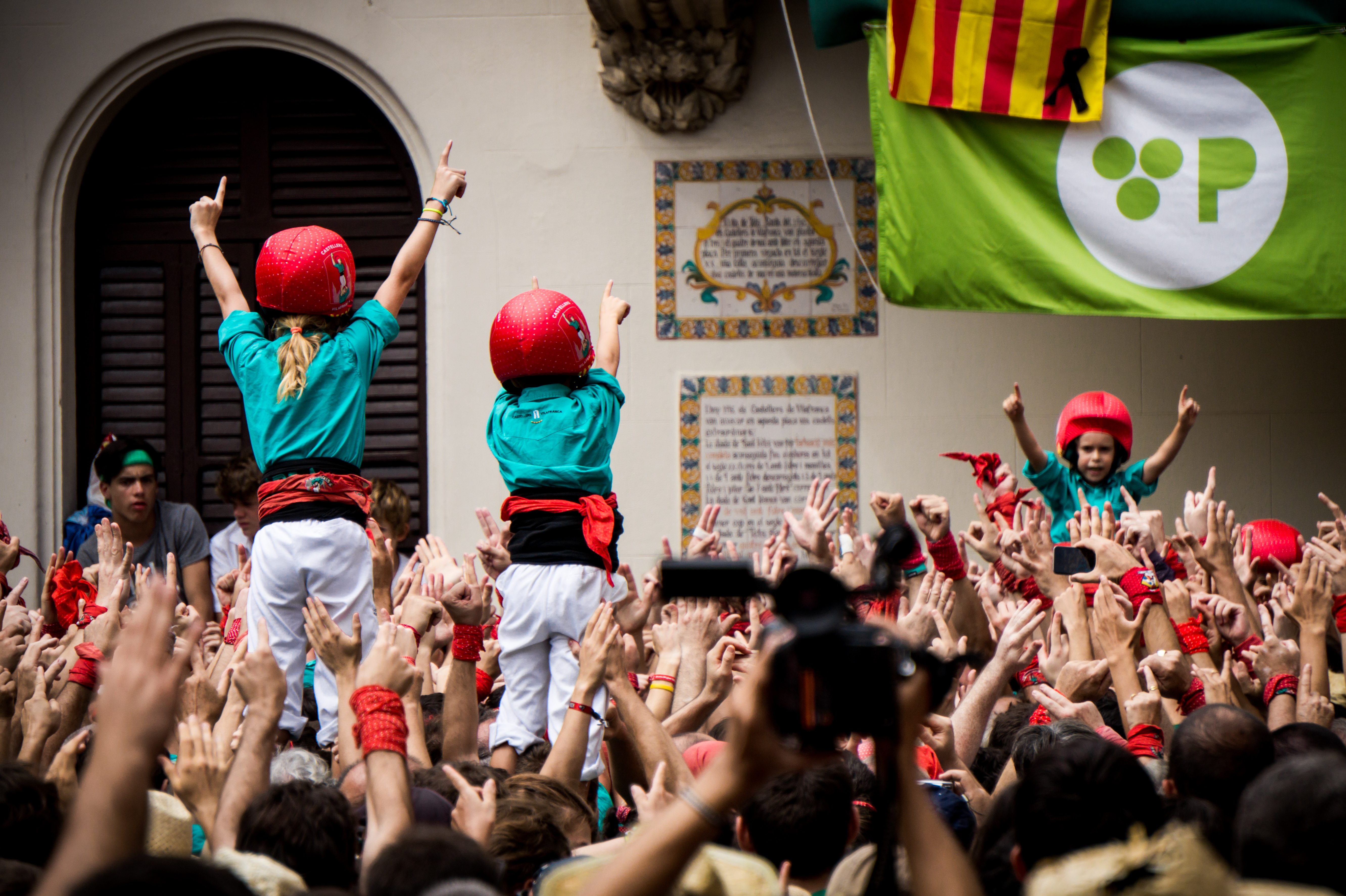 Celebración de los Castellers de Vilafranca en la Fiesta Mayor de Villafranca de Panadés 2017.